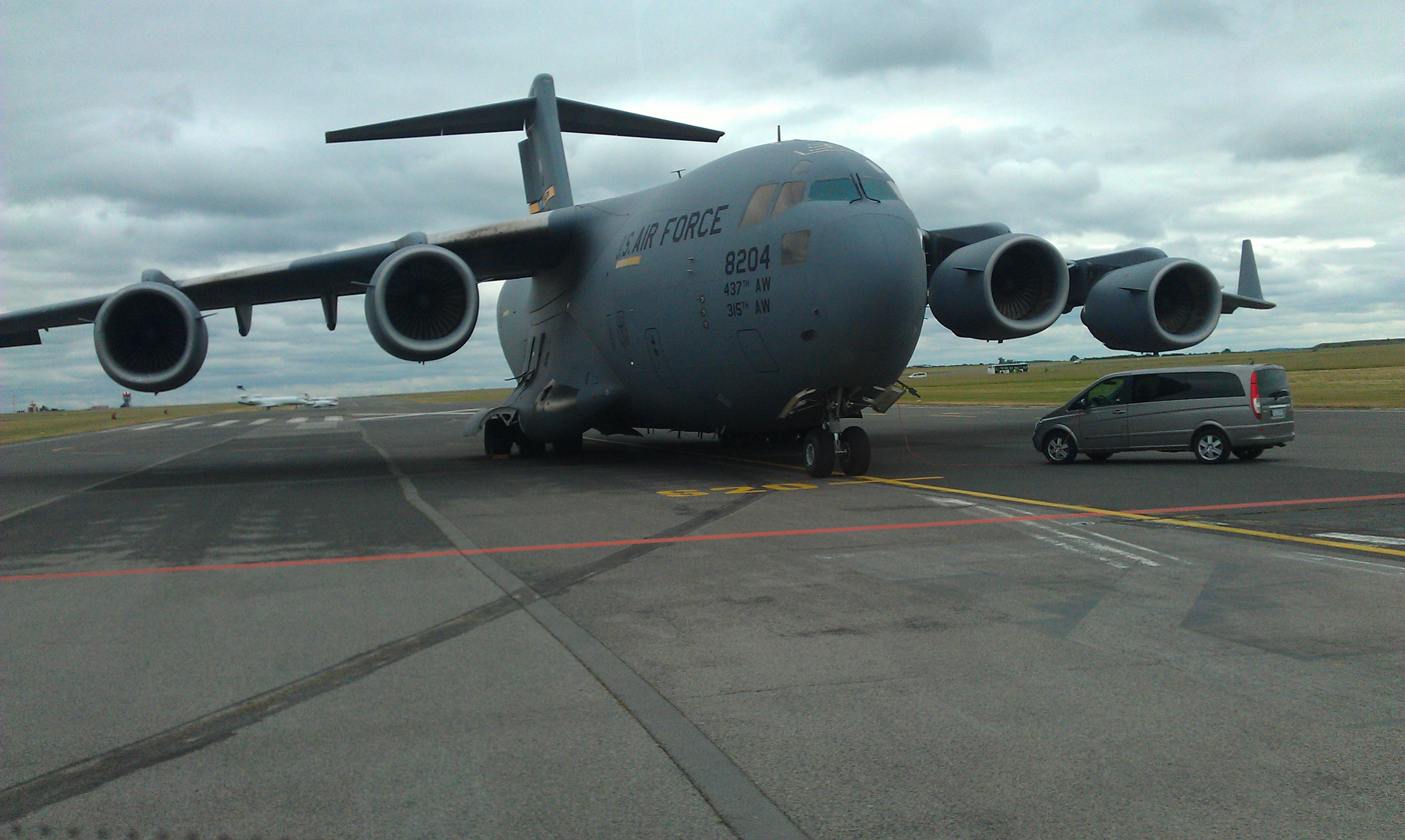 Tímto letadlem přiletěl do Prahy David Petraeus, šéf CIA. Tehdejší letiště Ruzyně, dnes Letiště Václava Havla.